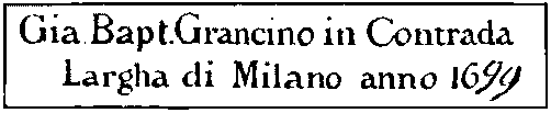 Signature Gia-Battista Grancino - 1699